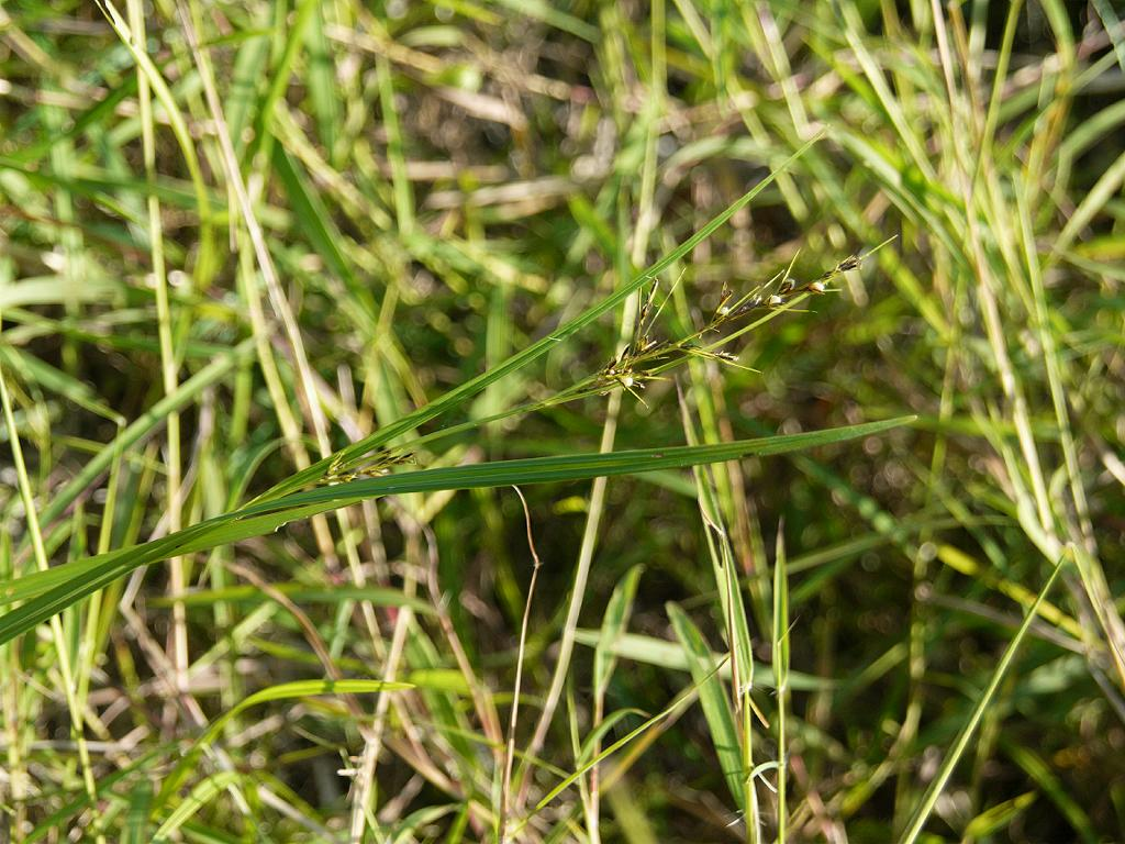 Scleria levis (Cyperaceae)：シンジュガヤ（カヤツリグサ科） 2008.10.13：和歌山県田辺市 Tanabe city,Wakayama pref. Japan